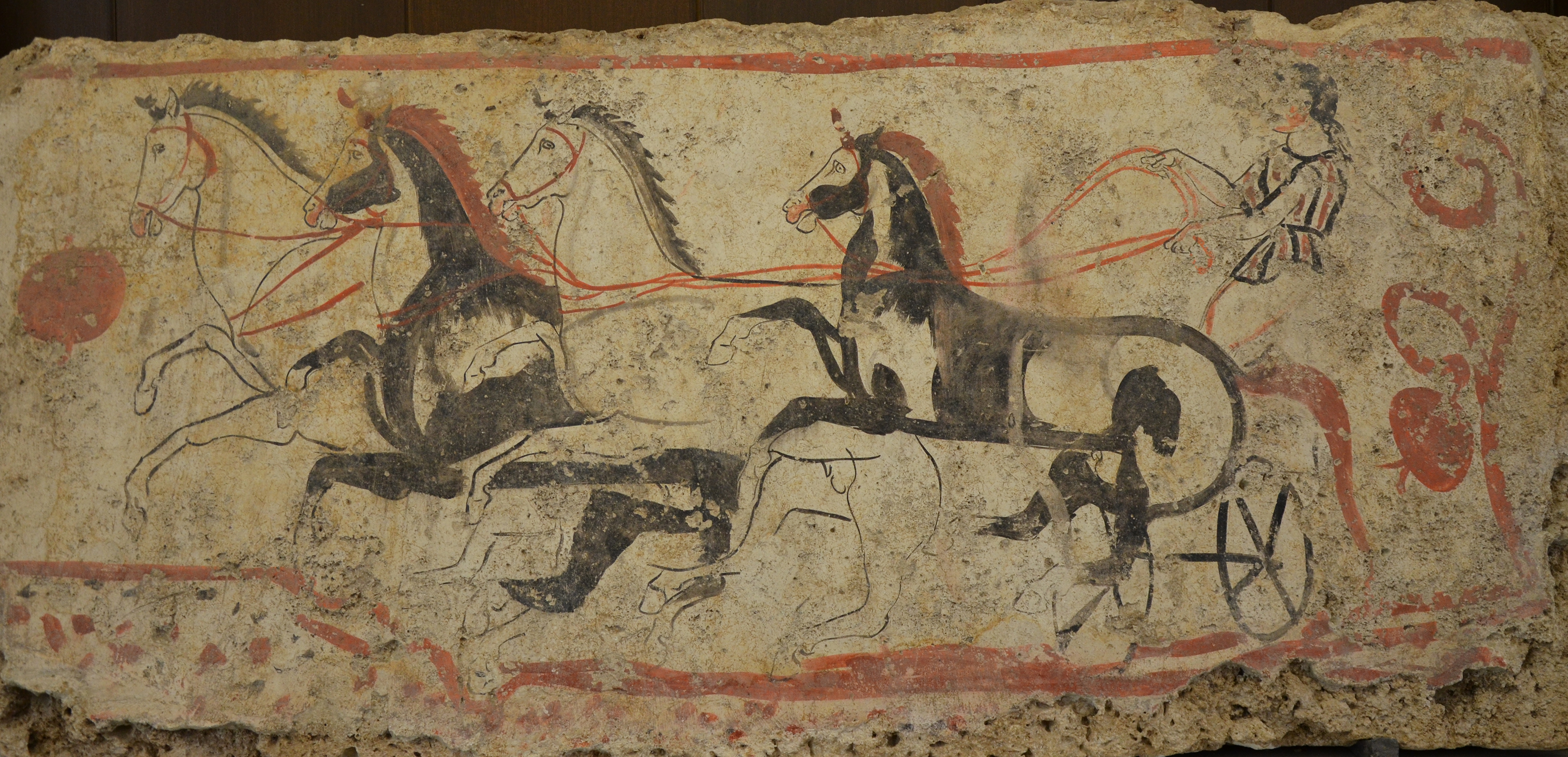 Lucanian fresco tomb painting depicting a quadriga, 340-330 BC, Paestum Archaeological Museum